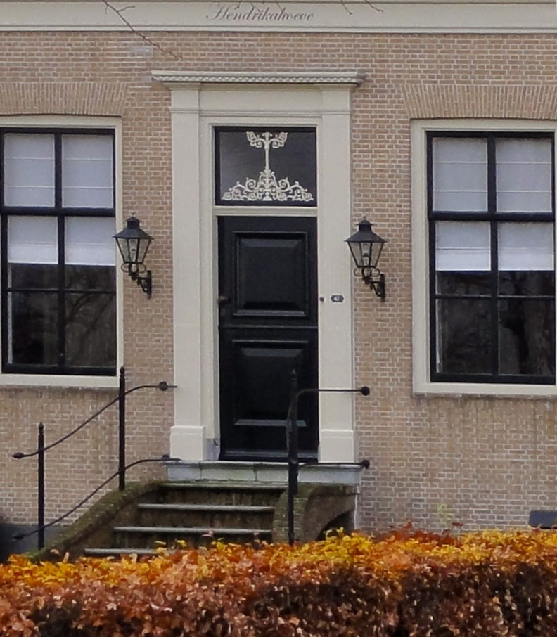 Benedenberg 42 Bergambacht (detail van de gevel aan de noordzijde met de toegangsdeur